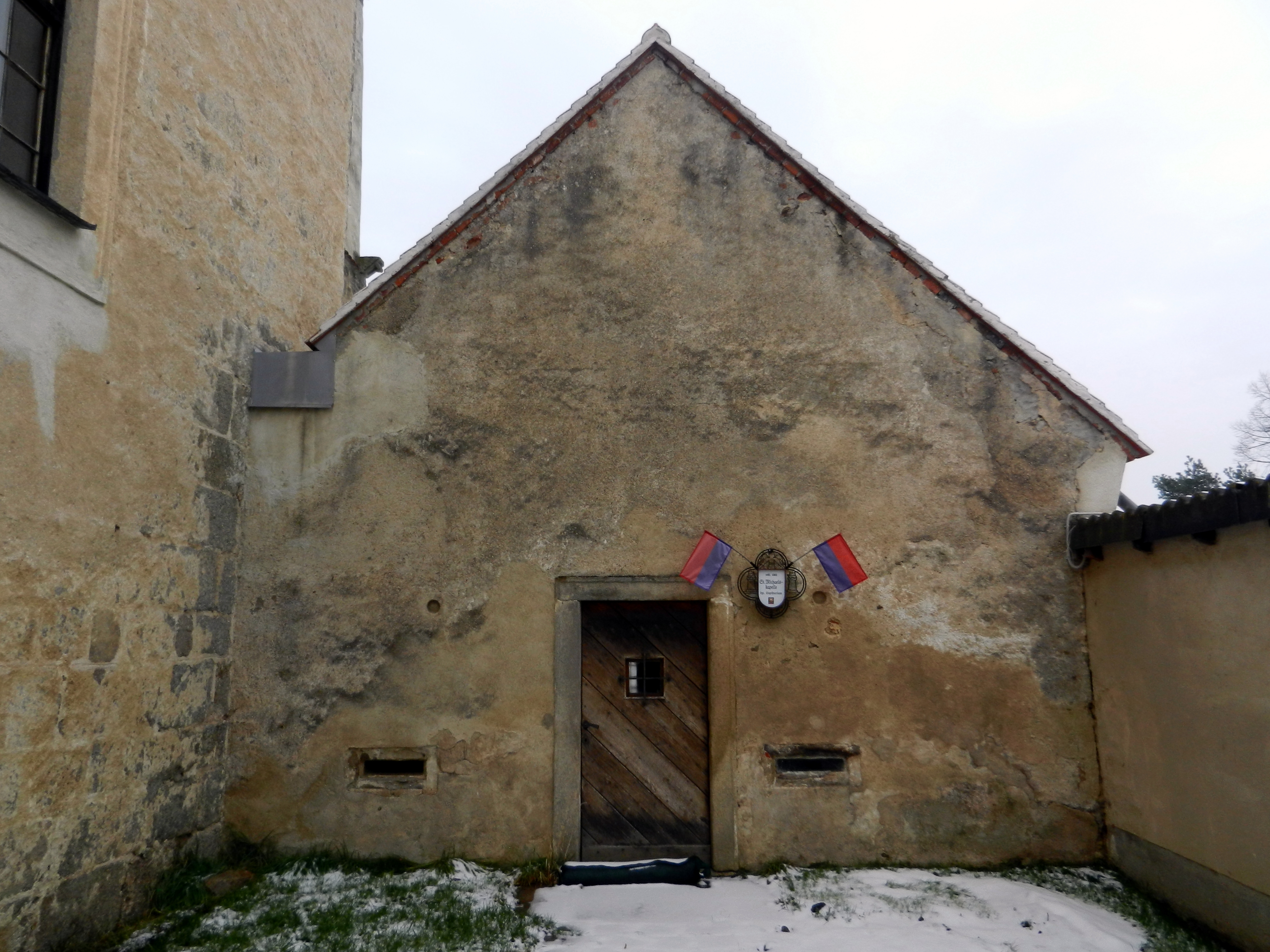 Eingang Michaelskapelle Propstei Zwettl